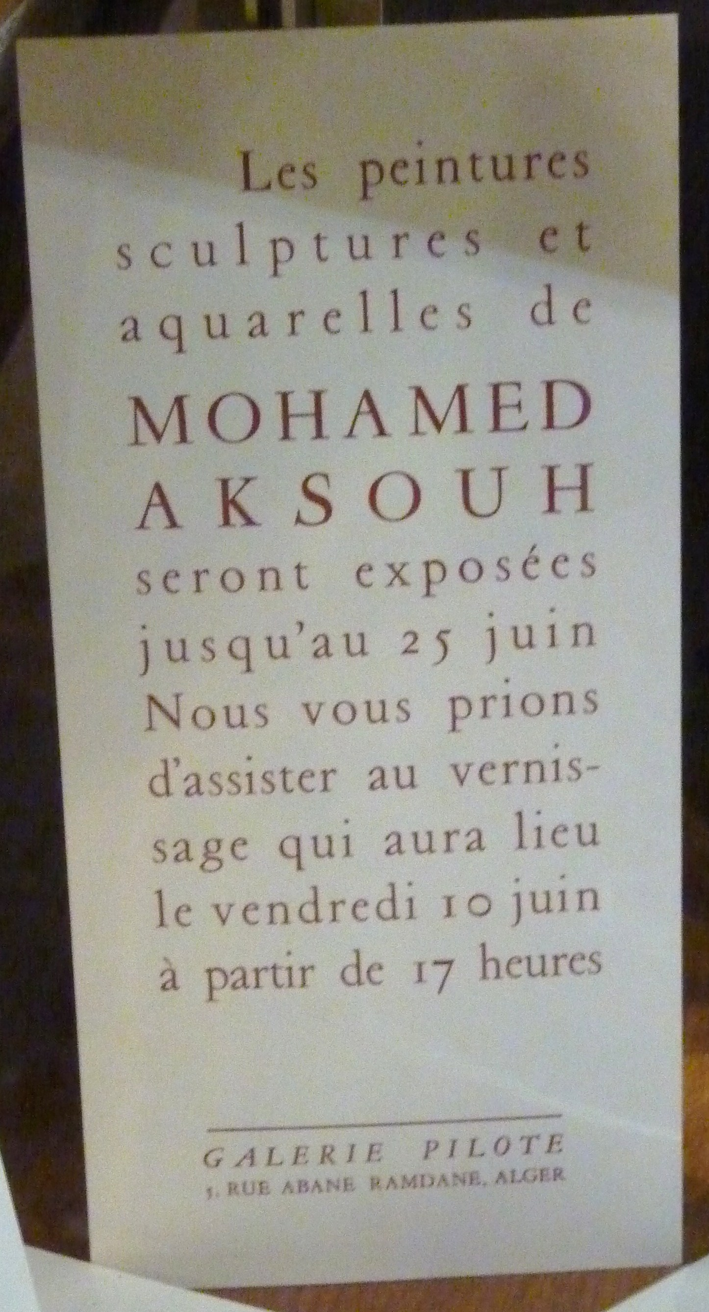 Invitation pour l'exposition du peintre algérien Mohamed Aksouh présentée à Alger en 1966 à la galerie "Pilote" animée par Edmond Charlot. Document figurant dans l'exposition organisée en 2015 par le musée de Pézenas en hommage à Edmond Charlot.